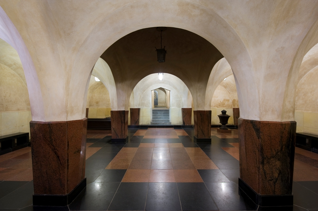 Vilniaus katedros požemiai